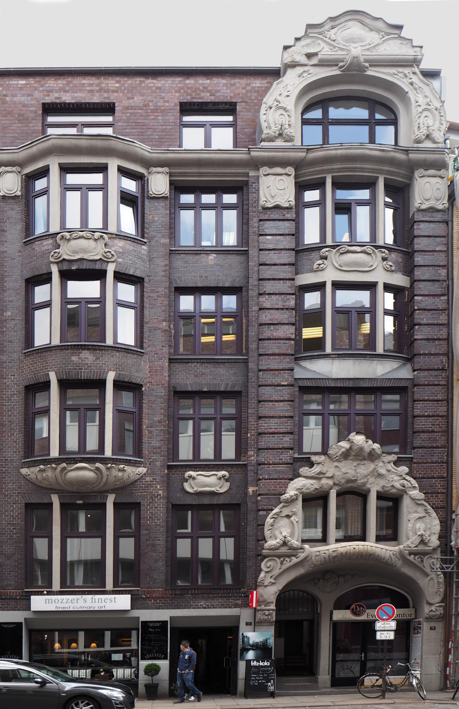 Hamburg-Altstadt, Cremonhaus , Cremon 10 bis 11, Foto: 2016